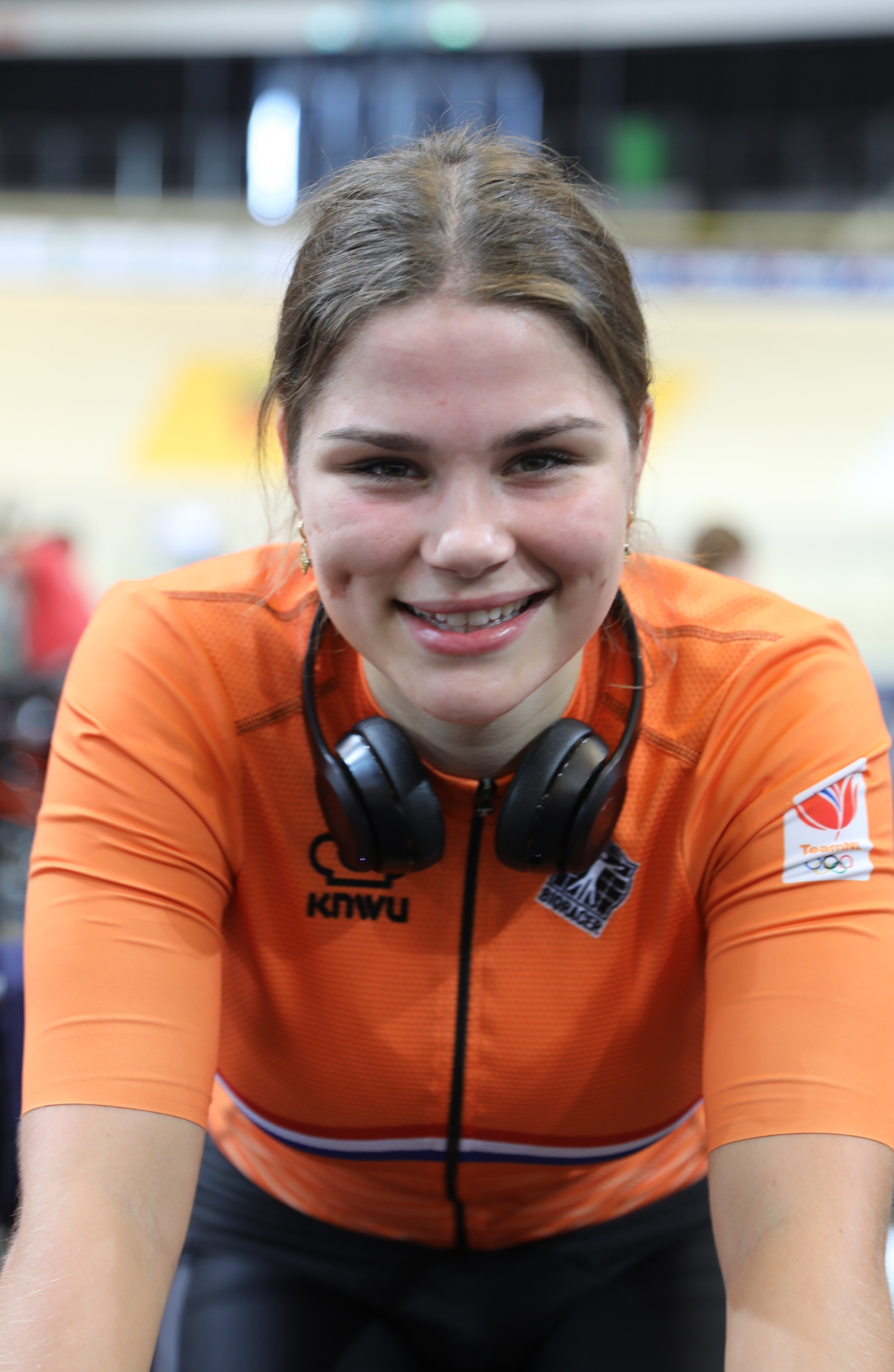 Amber van Hulst, niederländische Radsportlerin